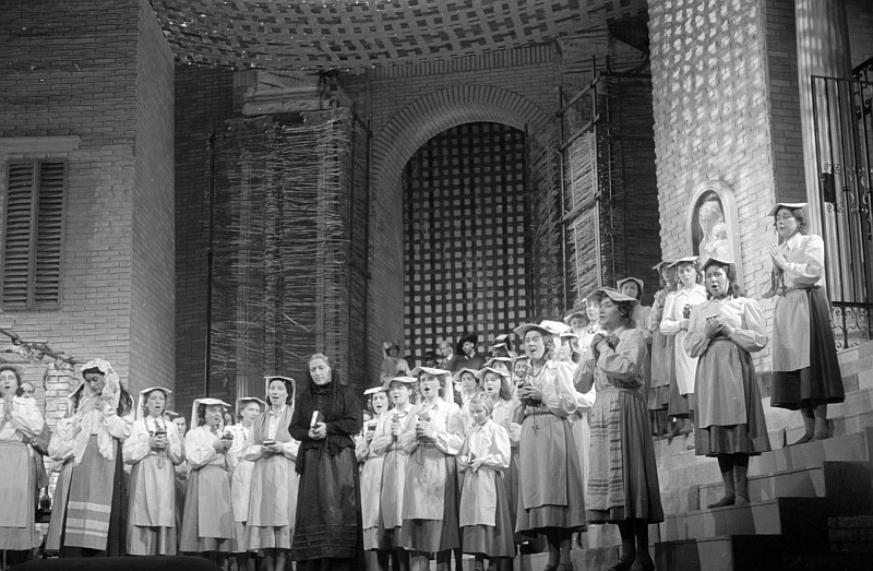 Original image description from the Deutsche Fotothek Szenenbilder